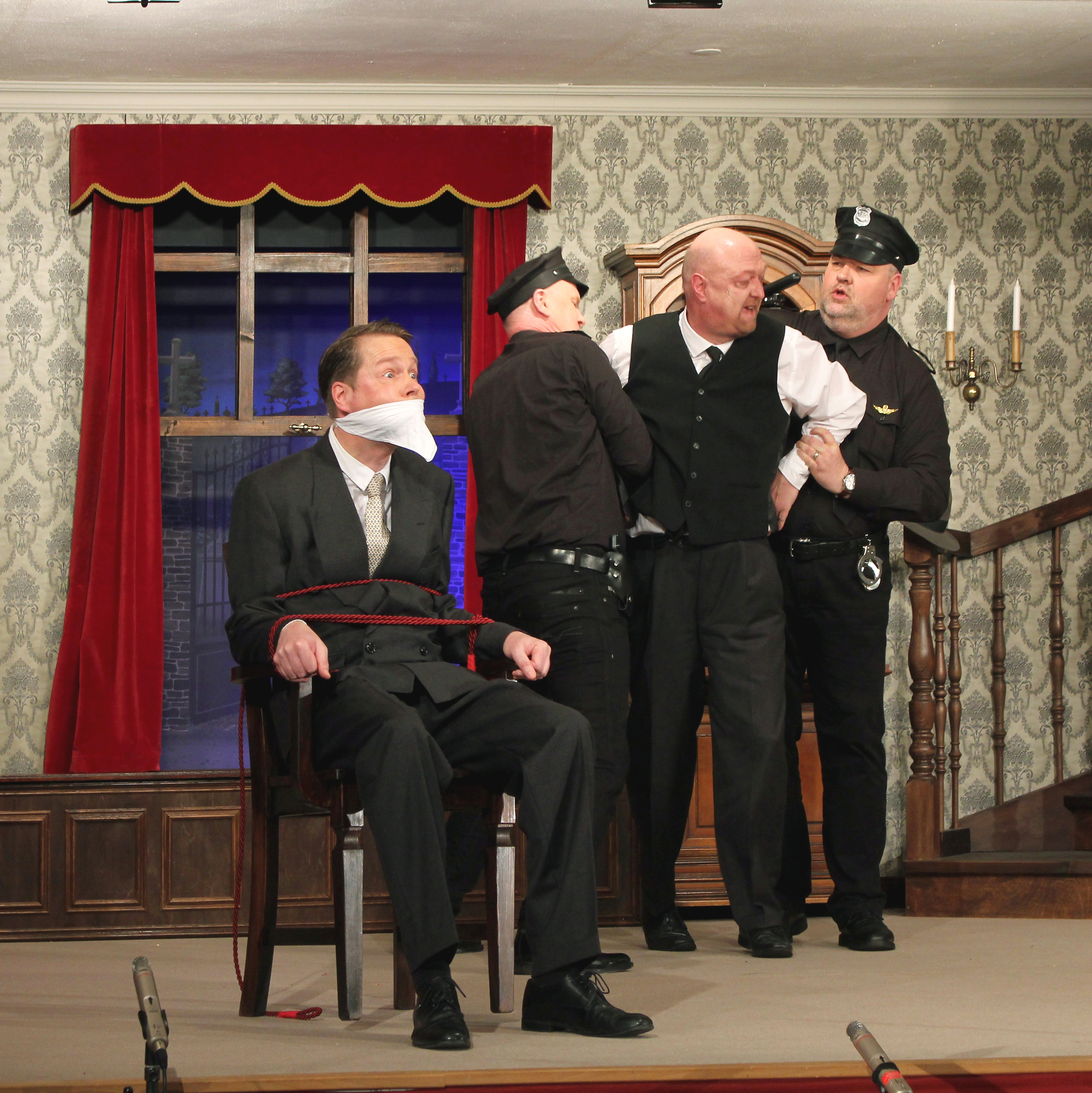 Arsen und Spitzenhäubchen, Aufführung der Kolping-Theatergruppe Kärlich, Szene: O’Hara und Brophy nehmen Jonathan Brewster fest